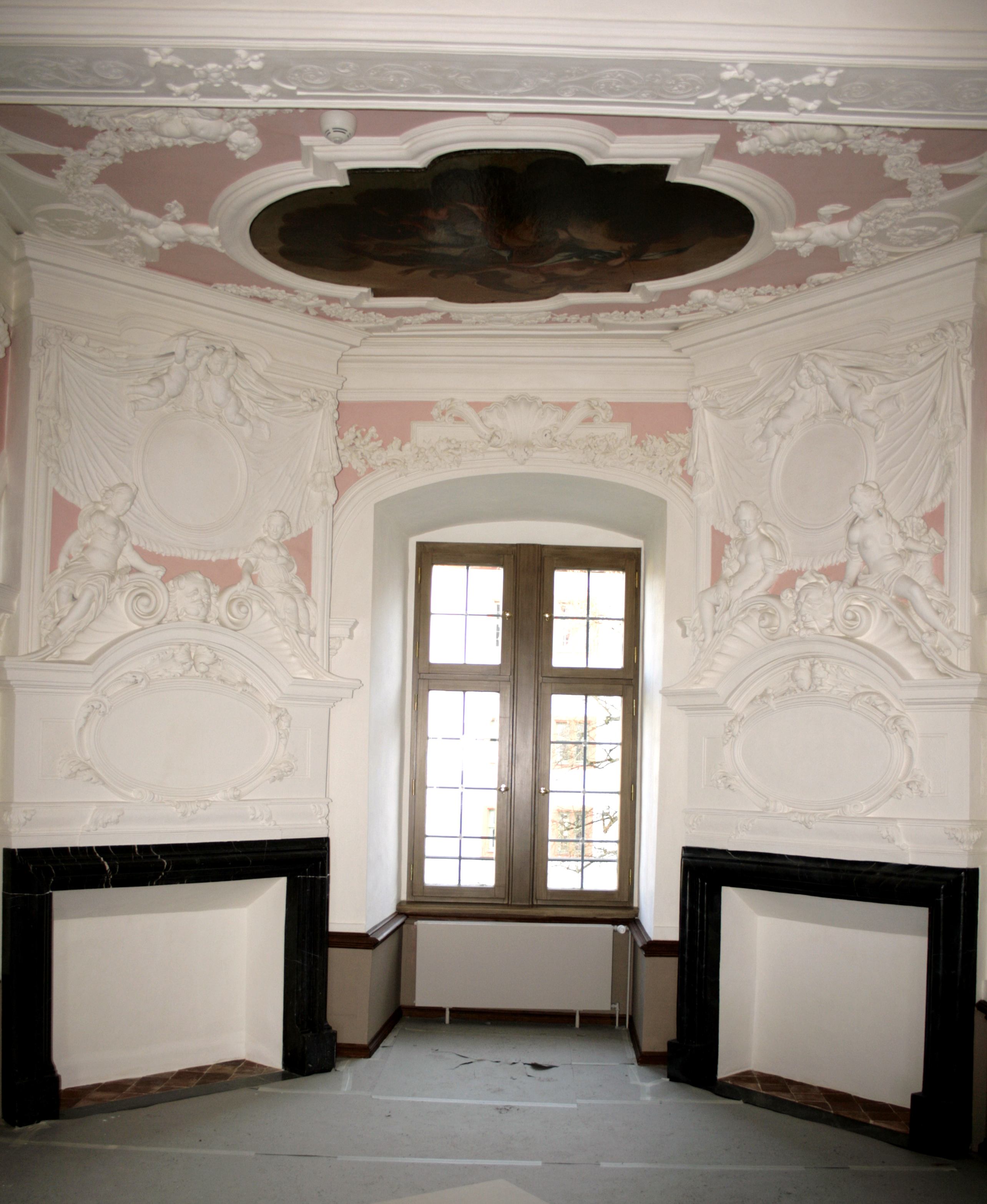 Stuckarbeiten im Schloss Hadamar, Deutschland